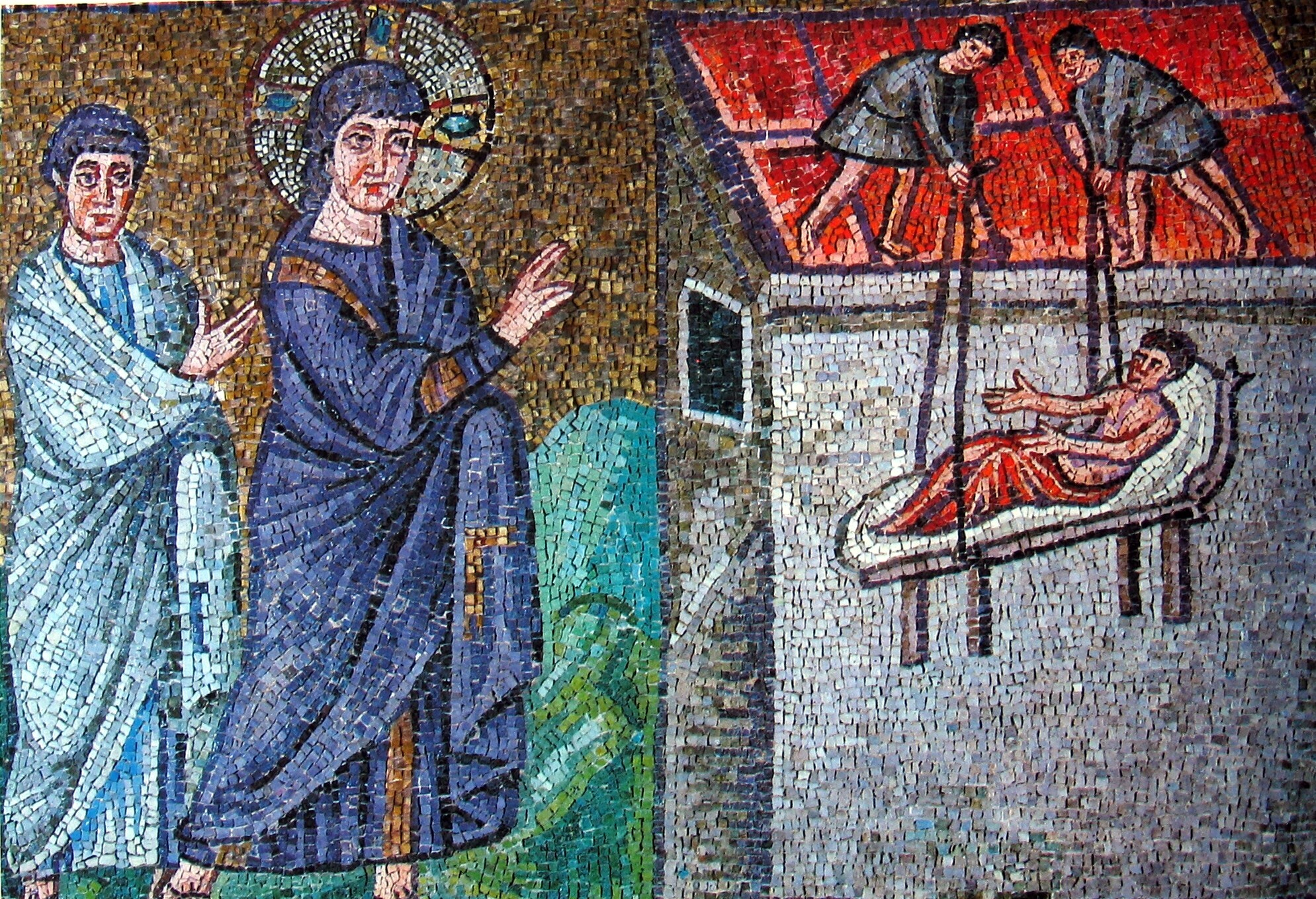 Mosaic in Basilica of Sant'Apollinare Nuovo.